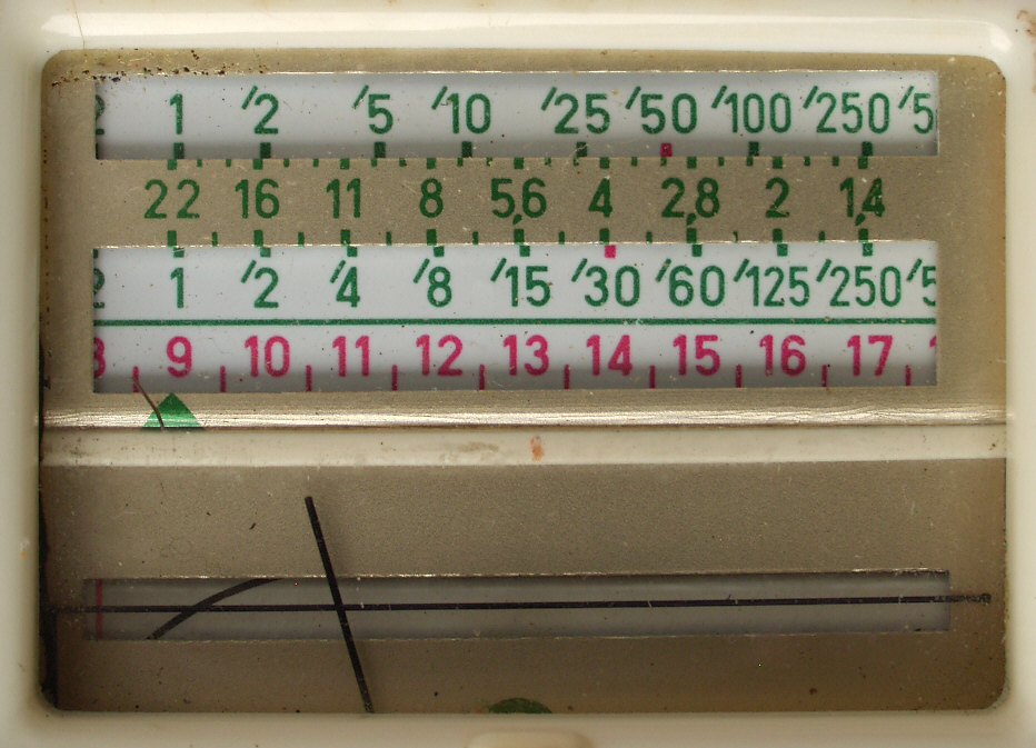 Skala des Belichtungsmessers Gossen Sixtomat, gebaut zwischen 1952 und 1958. Ablesemöglichkeit für zwei verschiedene Verschlusszeit-Reihen und Lichtwerte.